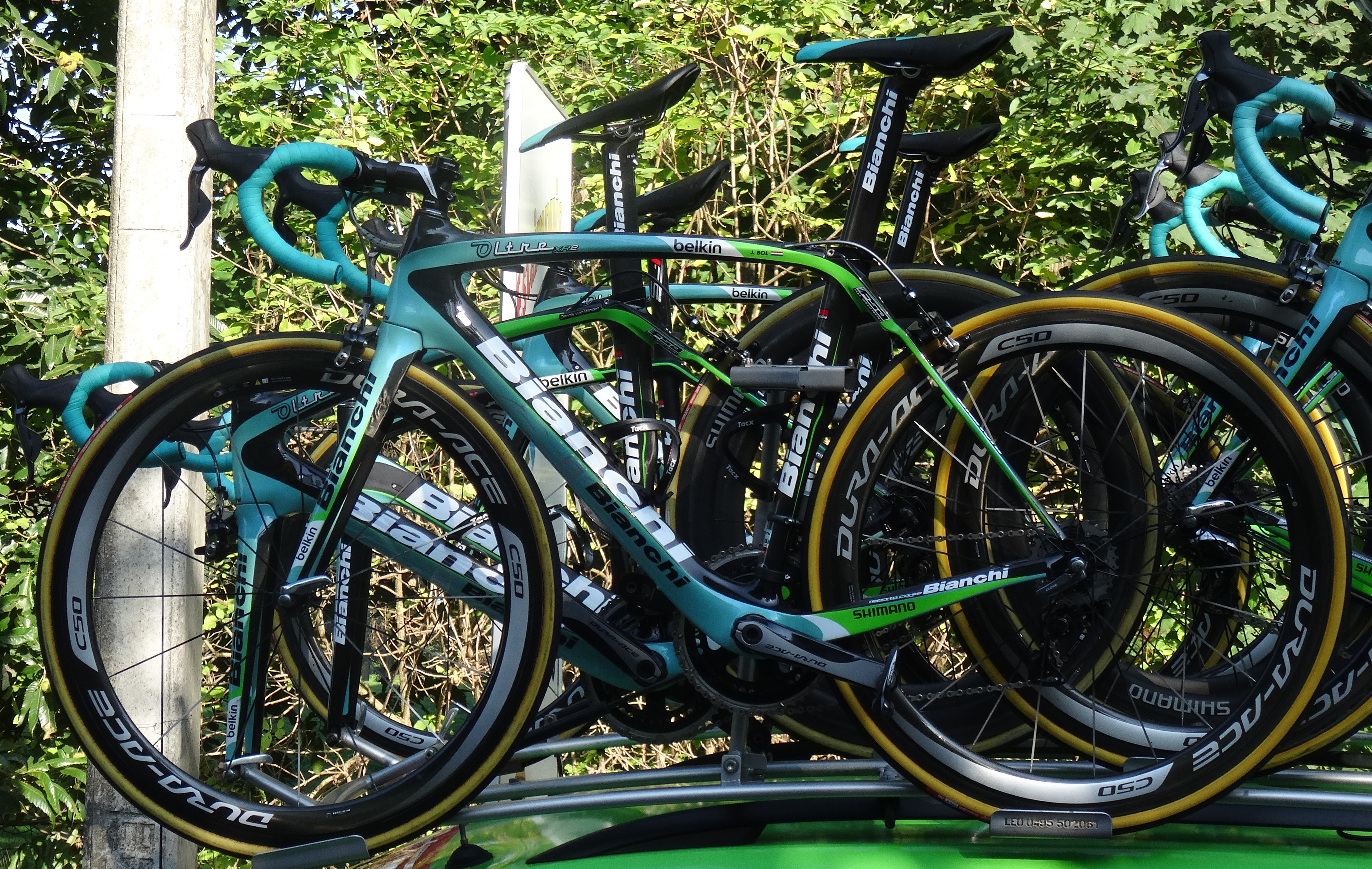 Reportage photographique réalisé le vendredi 3 octobre à l'occasion du départ de la deuxième étape de l'Eurométropole Tour 2014 à Estaimbourg (Estaimpuis), Belgique.